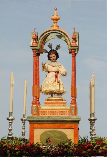 Paso del Niño Jesús, obra de Darío Fernández (2011), en la procesión del Corpus Christi de 2011 de El Viso del Alcor, Sevilla.